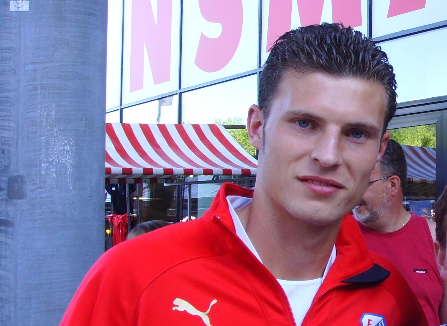 Erik Pieters, Dutch footballer